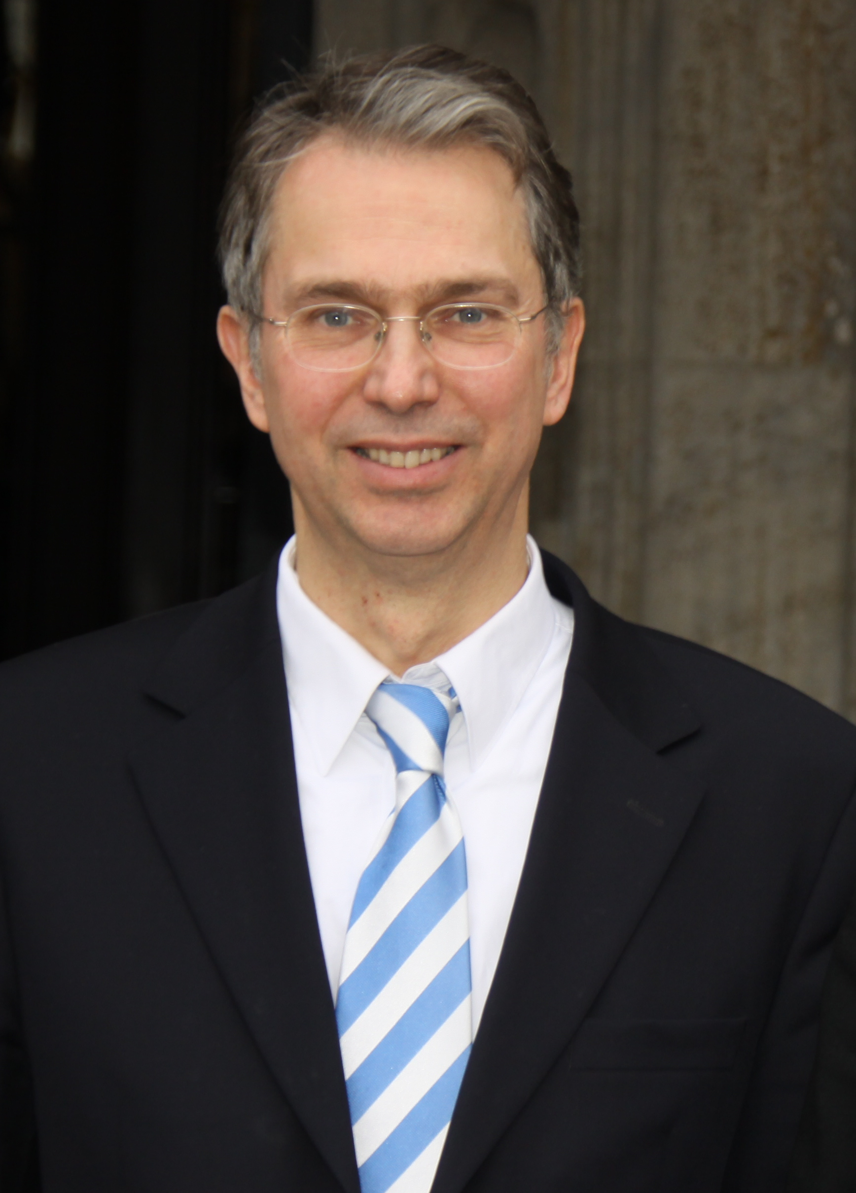 Patrick de La Lanne